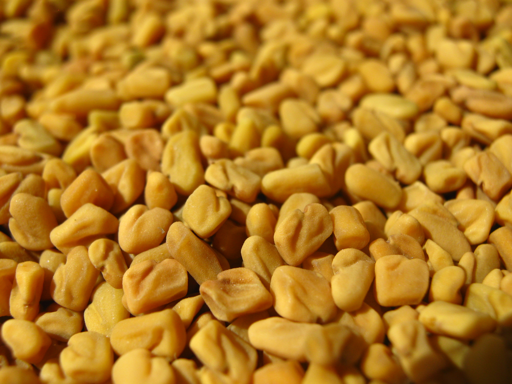 मेथी के बीज